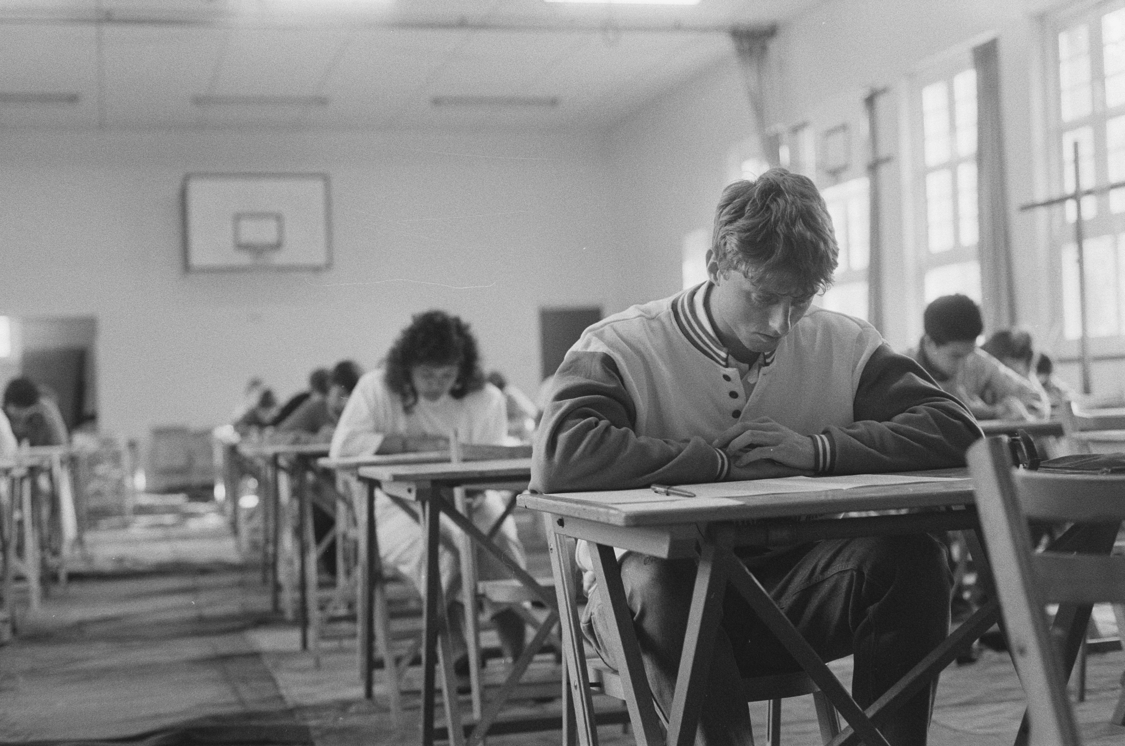 Collectie / Archief : Fotocollectie Anefo Reportage / Serie : [ onbekend ] Beschrijving : Eindexamens middelbare school weer begonnen Datum : 27 april 1987 Trefwoorden : EINDEXAMENS, scholen Fotograaf : Molendijk, Bart / Anefo Auteursrechthebbende : Nationaal Archief Materiaalsoort : Negatief (zwart/wit) Nummer archiefinventaris : bekijk toegang 2.24.01.05 Bestanddeelnummer : 933-9640